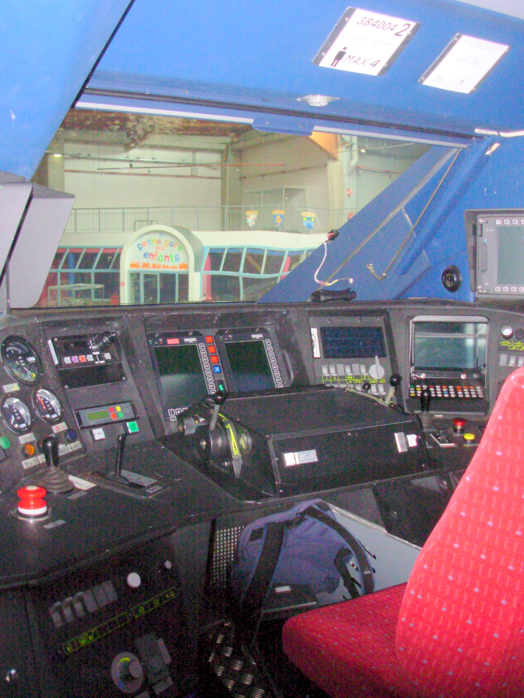 Cabine de conduite de la rame 4402, exposée Cité du train à Mulhouse, France